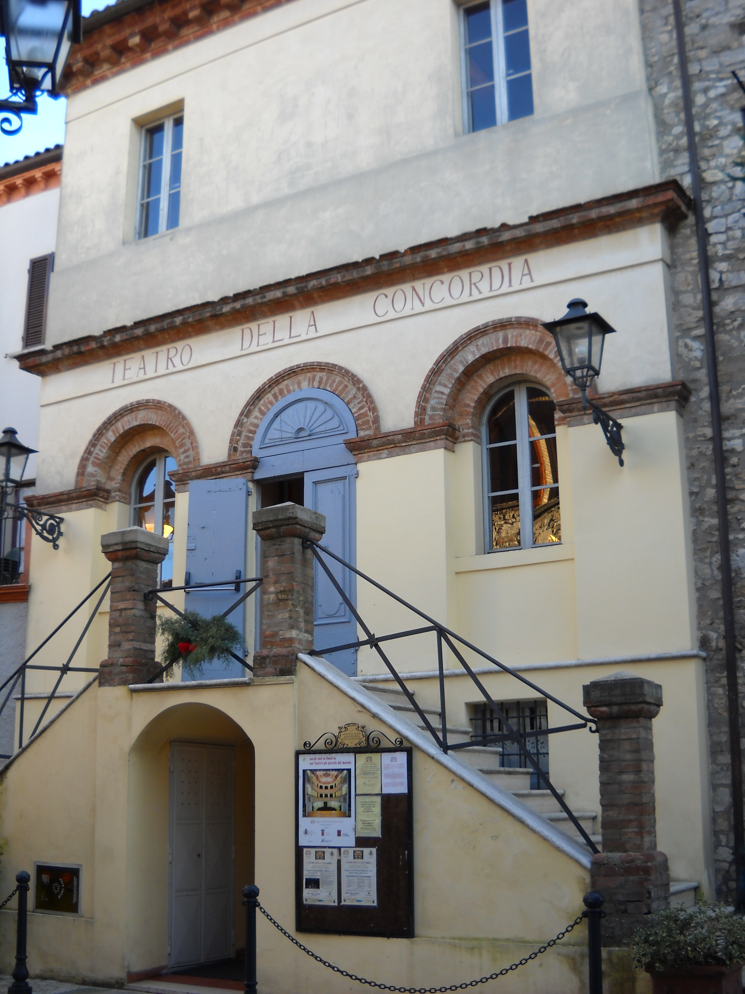 Teatro più piccolo d'Italia